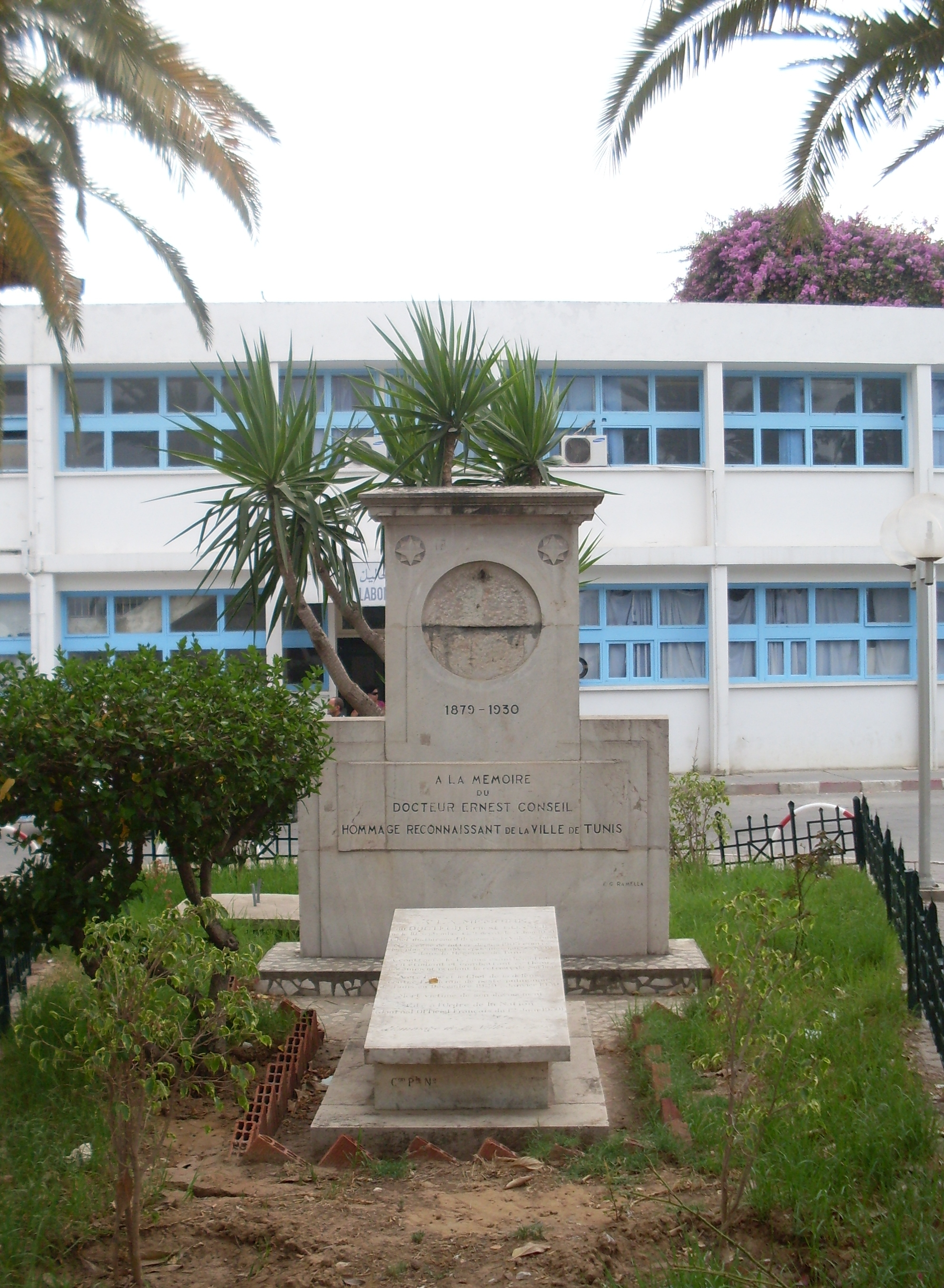 Mémorial de Dr. Ernest Conseil à l'Hôpital la Rabta de Tunis